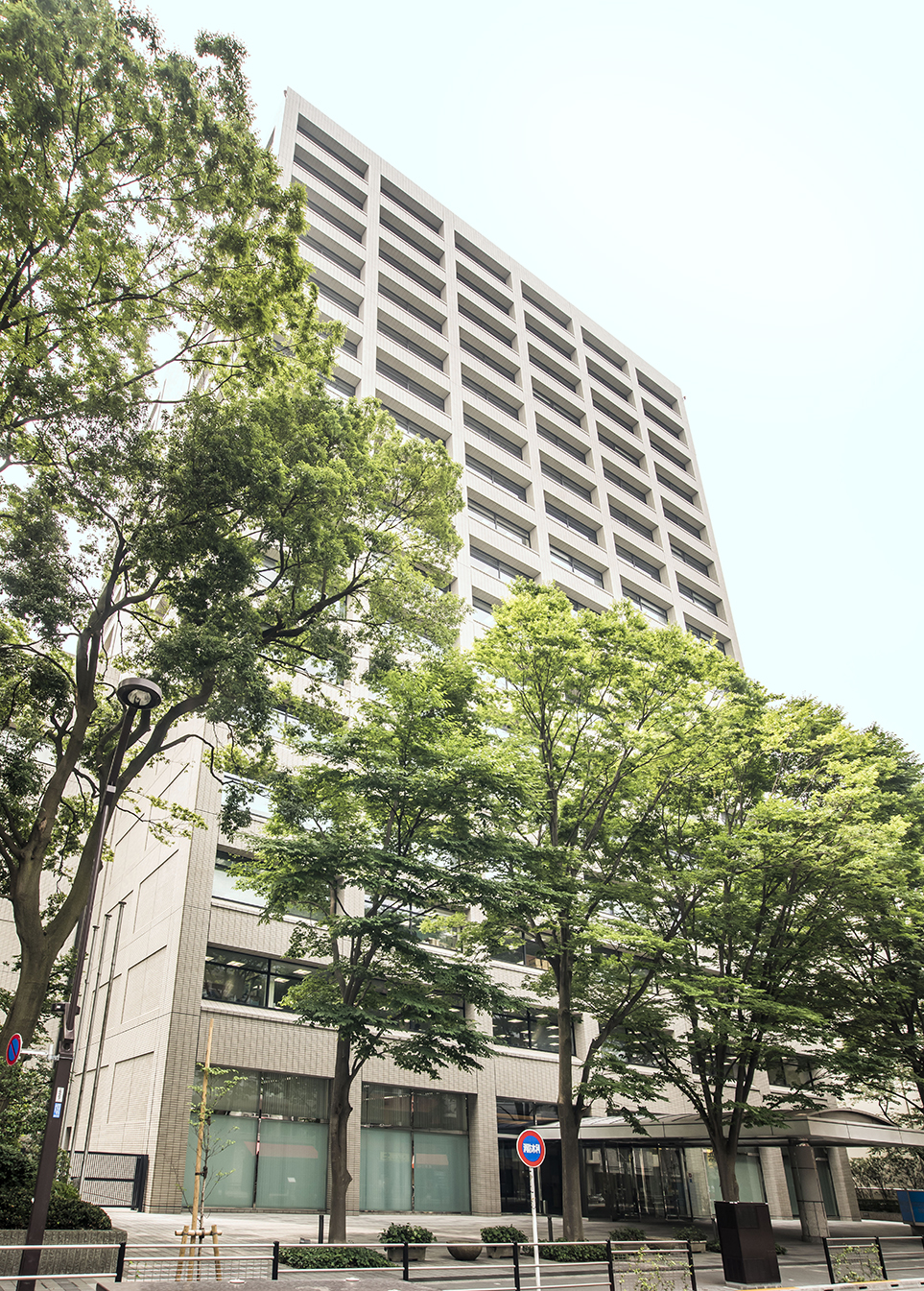 チヨダ本社（5階）